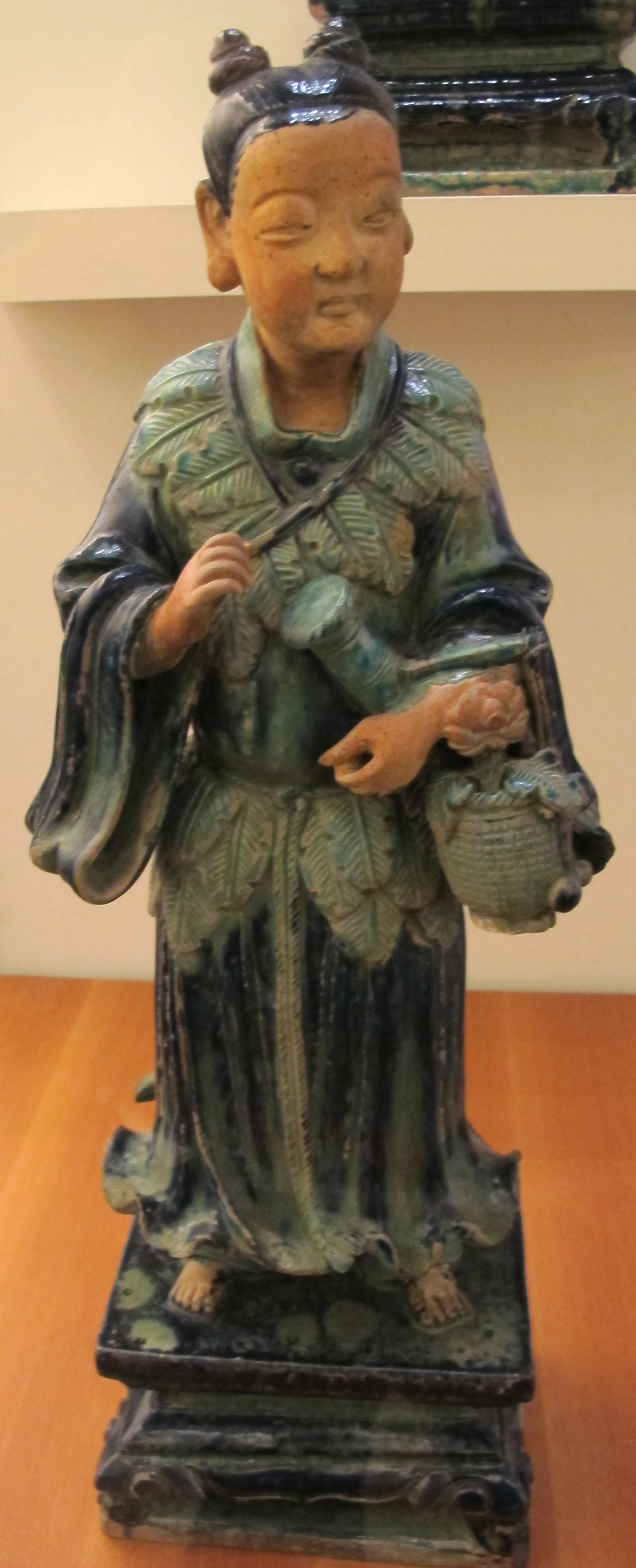 Dinastia ming, l'immortale lan caihe, 1510 ca.